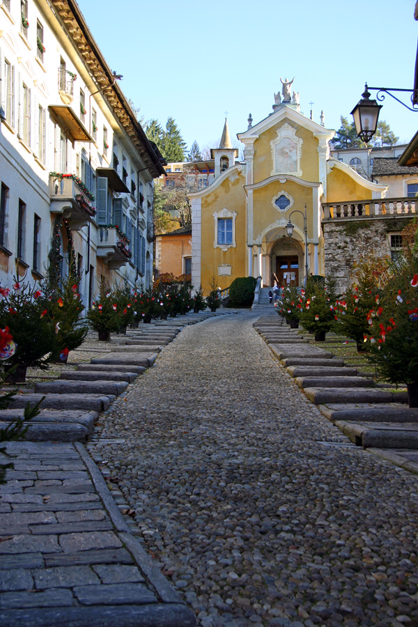 La "salita della Motta", addobbata per il periodo natalizio. Alla sommità la parrocchiale di Santa Maria Assunta.